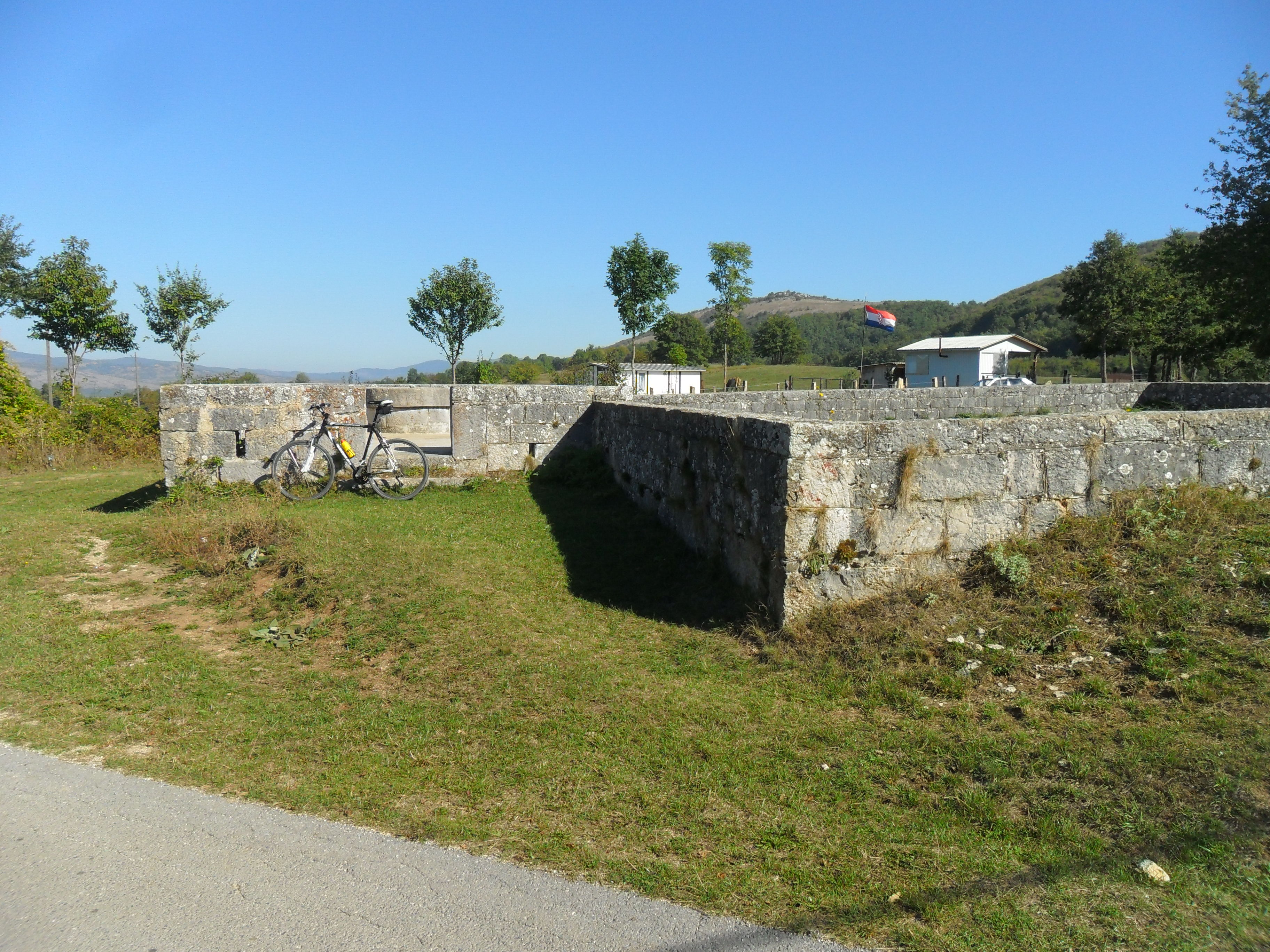 Šterna u Breštanima